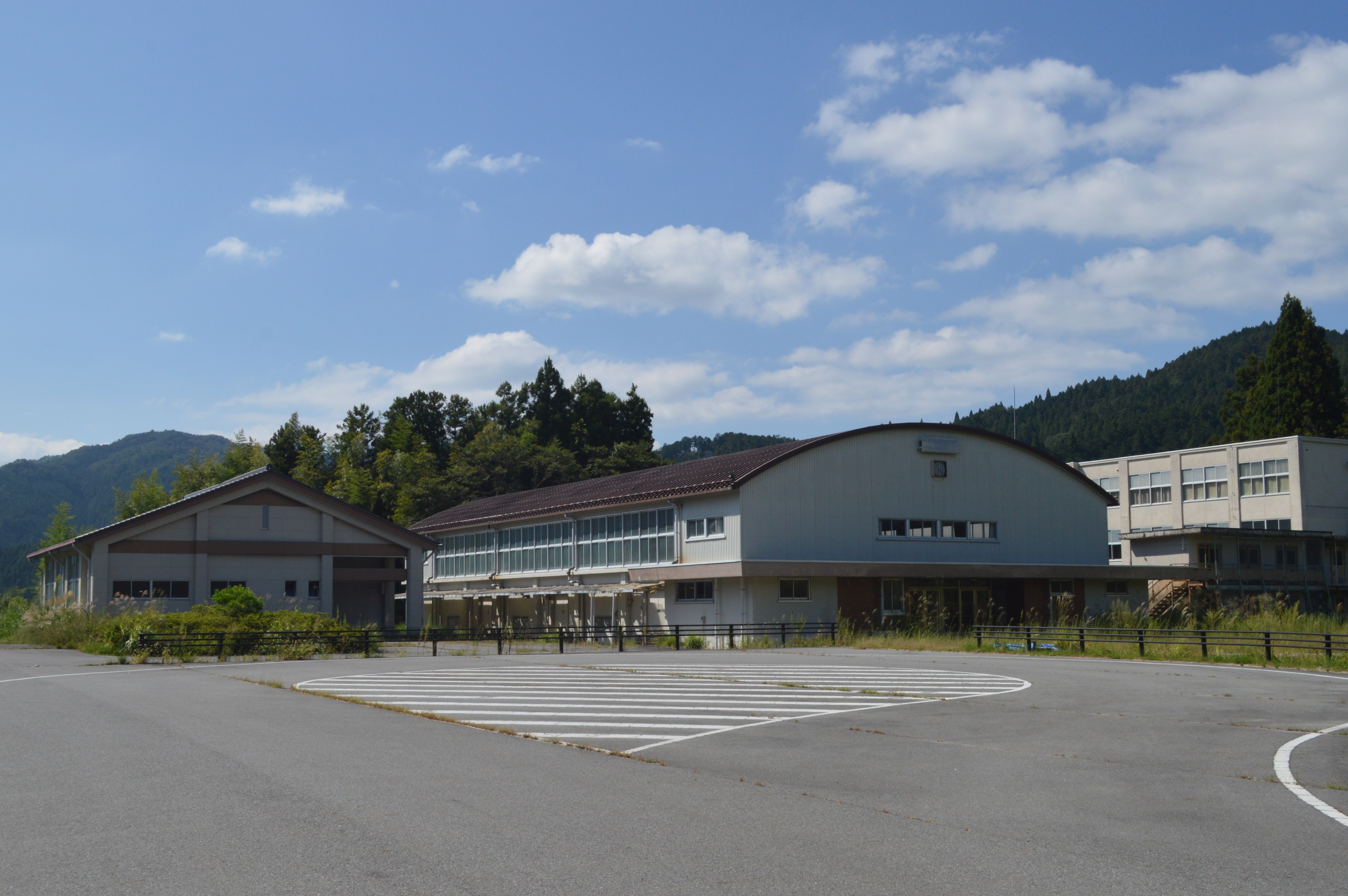 かつて愛知県豊田市稲武町にあった愛知県立田口高等学校稲武校舎。2008年廃校。